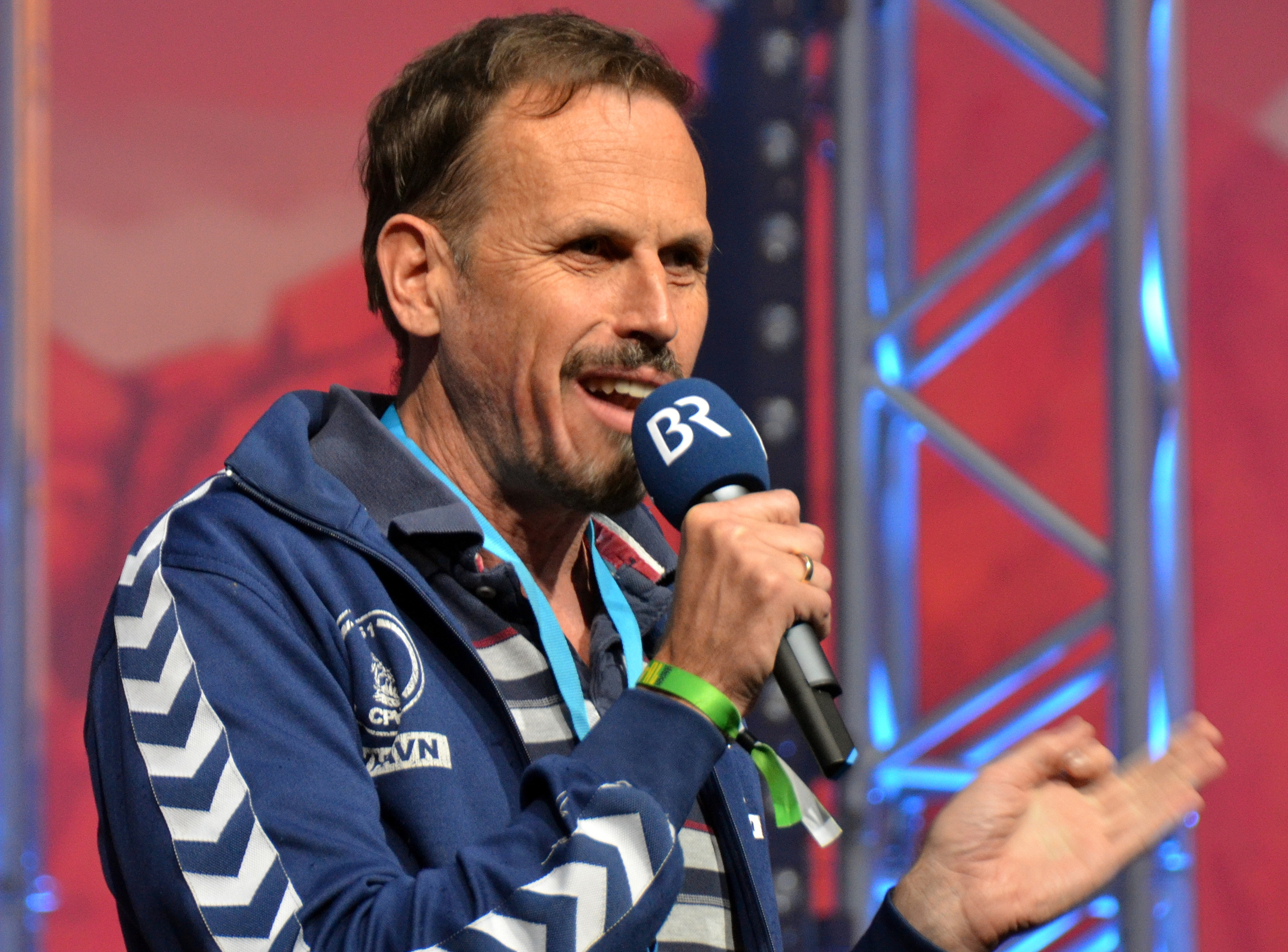 Heimatsound-Festival 2014, Achim Bogdahn Festivalsommer This photo was created with the support of donations to Wikimedia Deutschland in the context of the CPB project "Festival Summer". This file is made available under the Creative Commons CC0 1.0 Universal Public Domain Dedication. The person who associated a work with this deed has dedicated the work to the public domain by waiving all of their rights to the work worldwide under copyright law, including all related and neighboring rights, to the extent allowed by law. You can copy, modify, distribute and perform the work, even for commercial purposes, all without asking permission. Personality rights warningAlthough this work is freely licensed or in the public domain, the person(s) shown may have rights that legally restrict certain re-uses unless those depicted consent to such uses. In these cases, a model release or other evidence of consent could protect you from infringement claims.